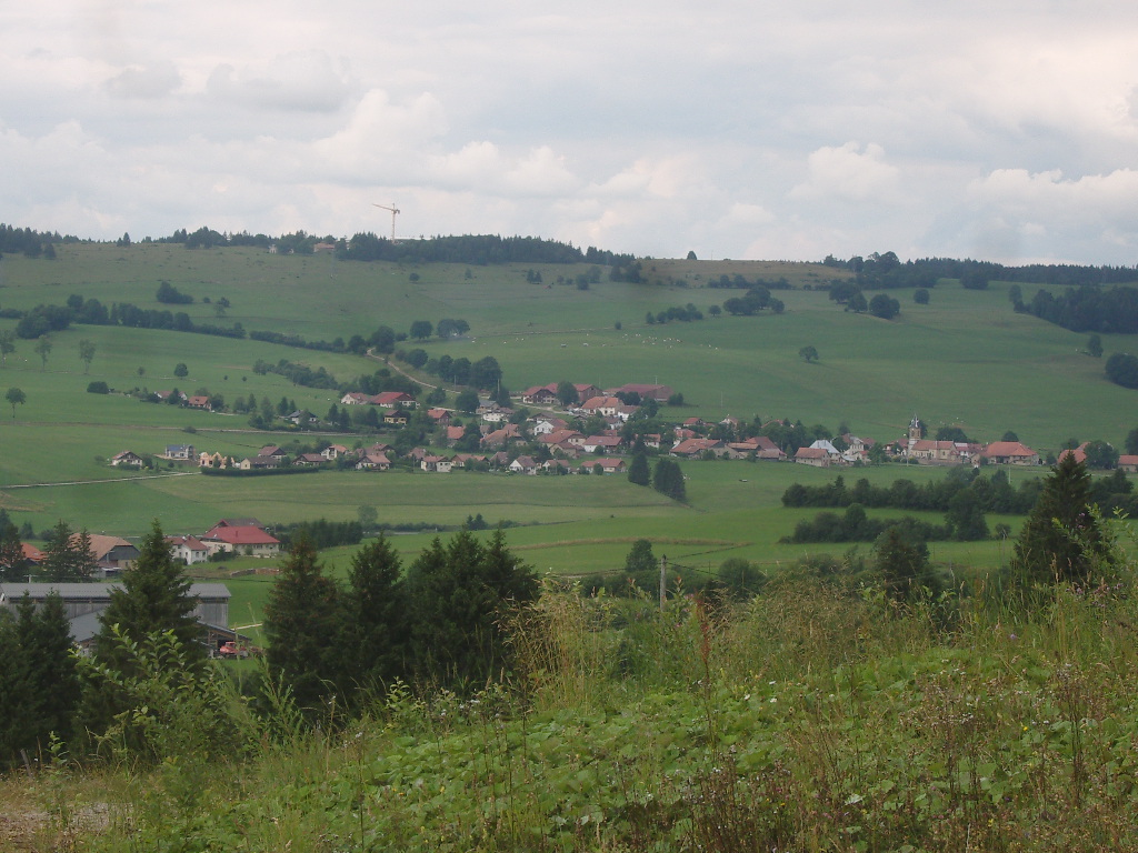 Saint-Antoine (Doubs) - vue générale